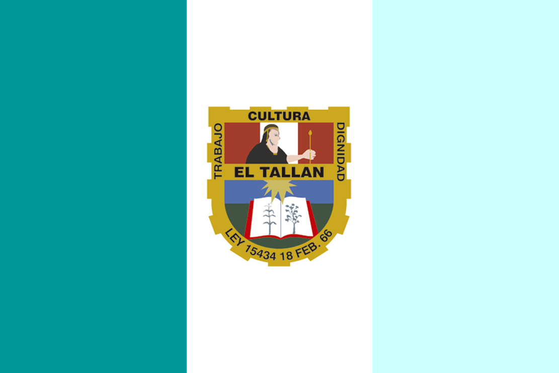 Bandera El Tallán